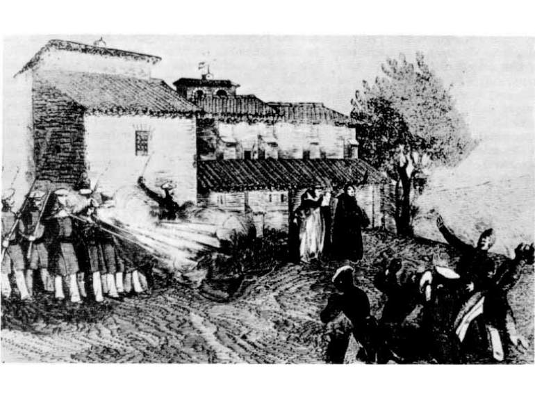 Dibujo representando los fusilamientos de Estella durante la Primera Guerra Carlista en España. Autor desconocido. La Ilustración Española, 1879 y Guia histórico descriptiva del viajero en el señorío de Vizcaya, 1864 de Juan Bautista Delmas. Publicada por vez primera en la obra ´´Galería Militar Contemporánea, tomo II, Madrid, 1846. lleva el pie: "Vista de Nuestra Sra. de Puig en el acto de verificarse el fusilamiento de orden (sic) de Maroto el 18 de febrero de 1839. (Esta lámina es vista original del sitio donde aconteció tan memorable suceso, mandado sacar por la redacción de esta obra.)".